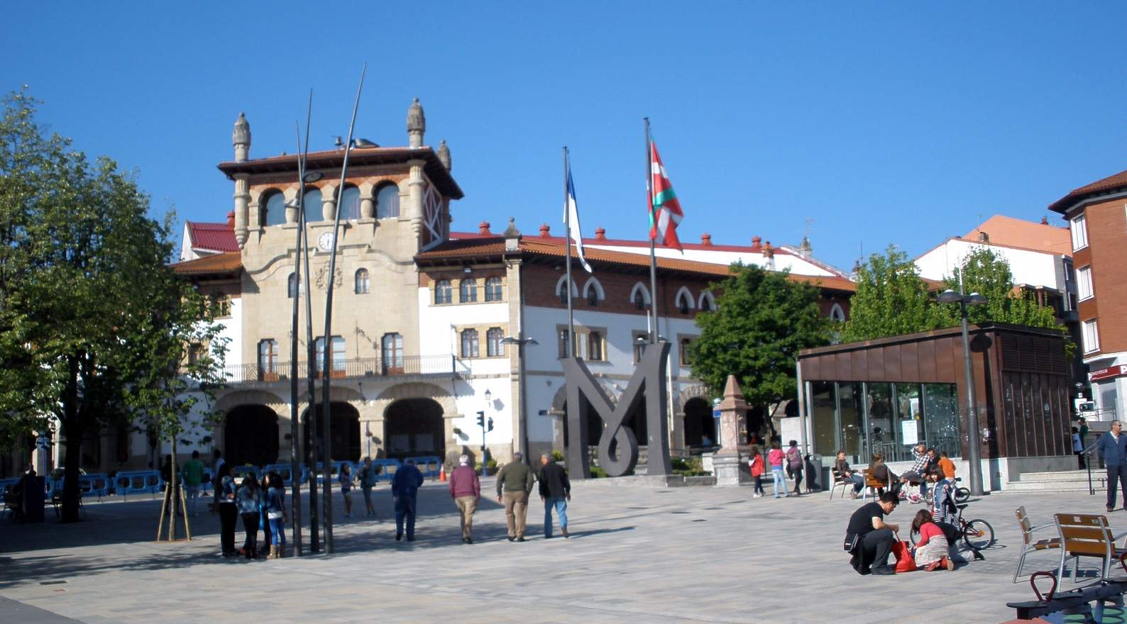 Paisaje urbano de Mungia (Vizcaya)